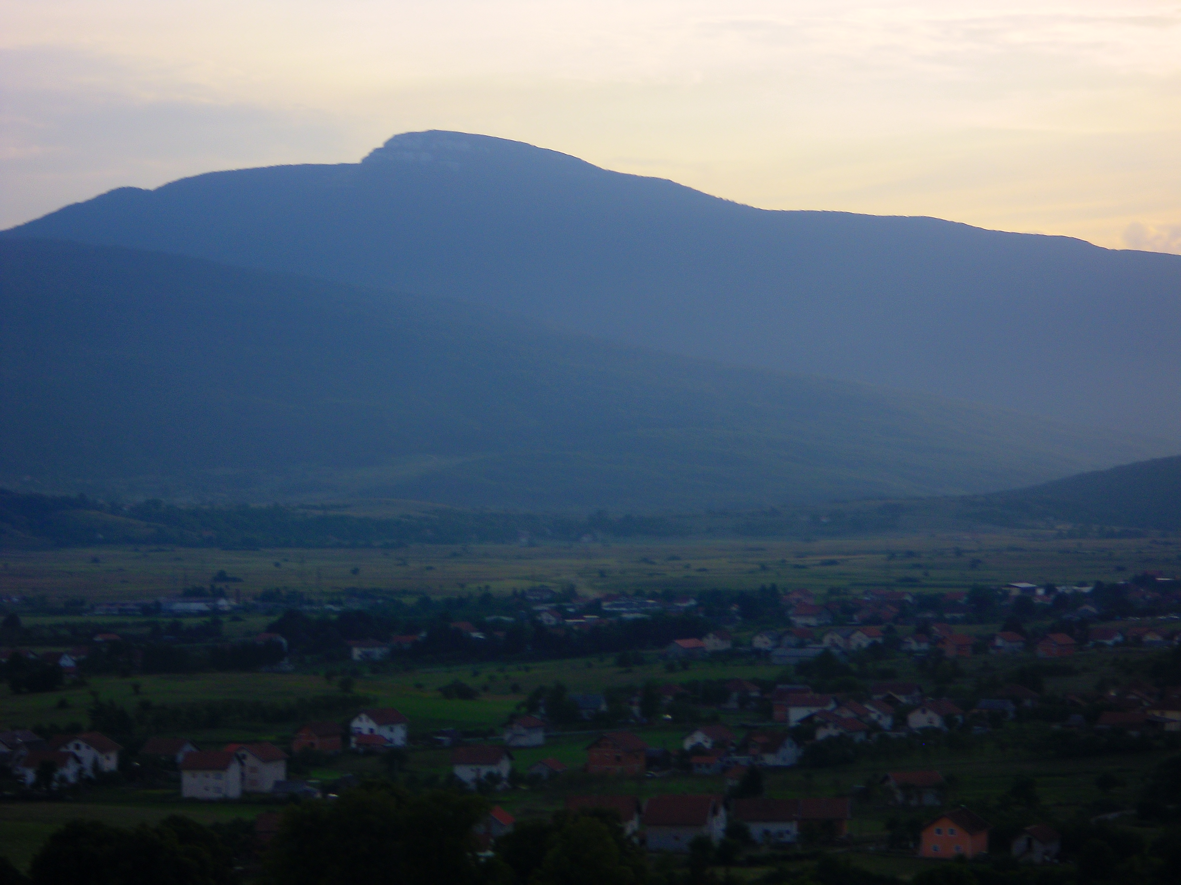 Planina Osječenica iznad Bosanskog Petrovca